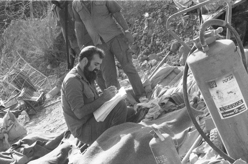 אסון צור השני, קצין עורך רישום נפגעים ליד חורבות בית הממשל בצור.